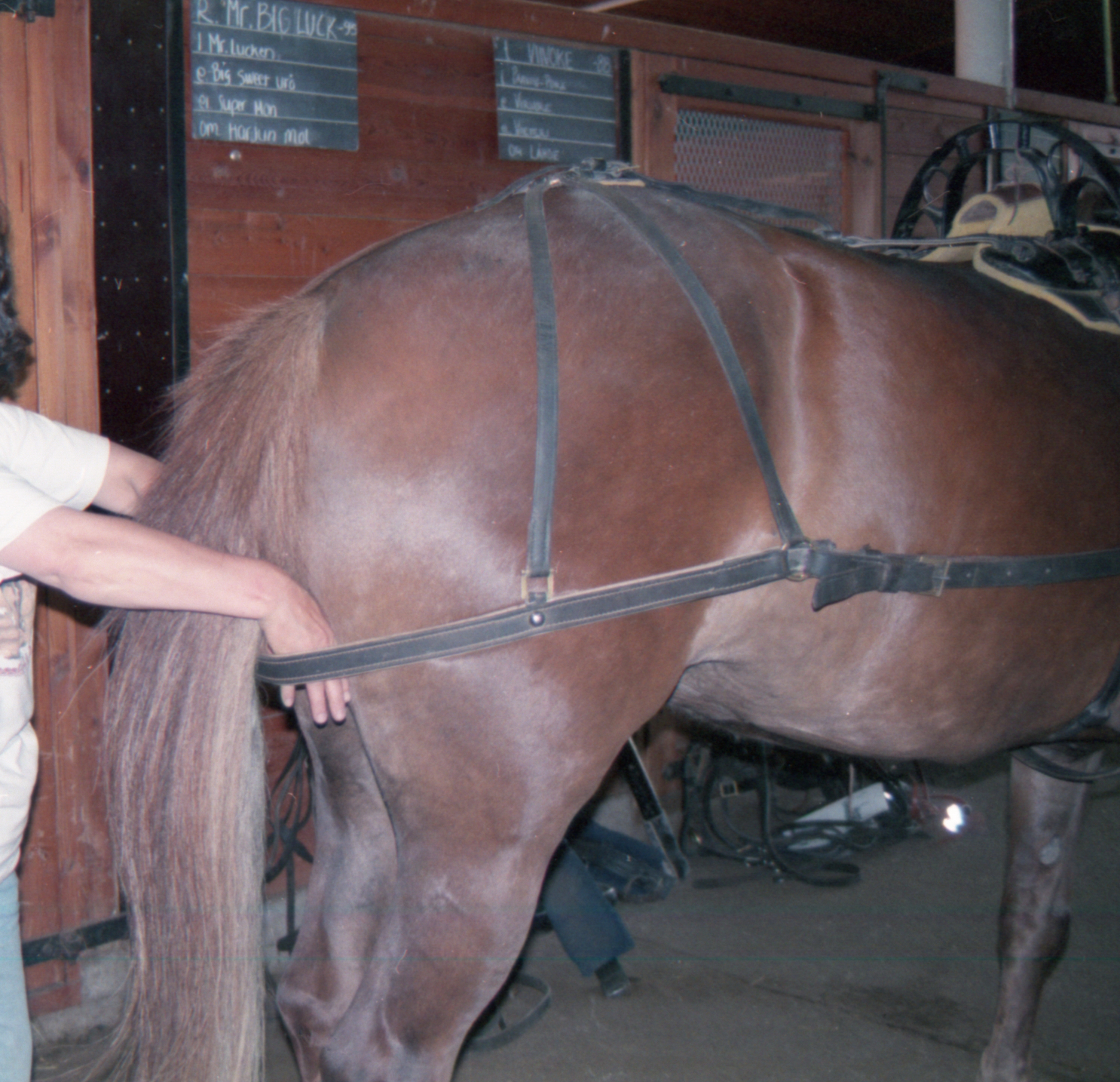 Tuli-Toto valjastusmannekiinina 1997 harju1997303